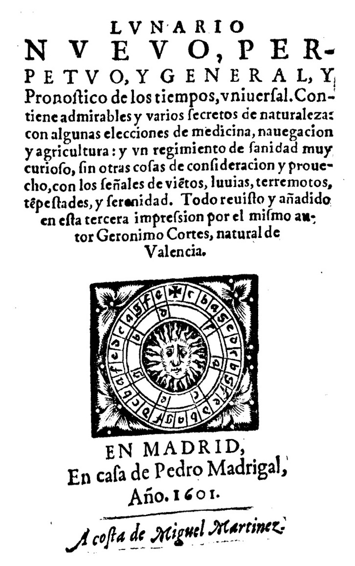 Lunario nueuo, perpetuo, y general, y pronostico de los tiempos, vniuersal. Contiene admirables y varios secretos .... - En Madrid : en casa de Pedro Madrigal, ... : a costa de Miguel Martinez, 1601. - 136 c. : ill. ; 8º .